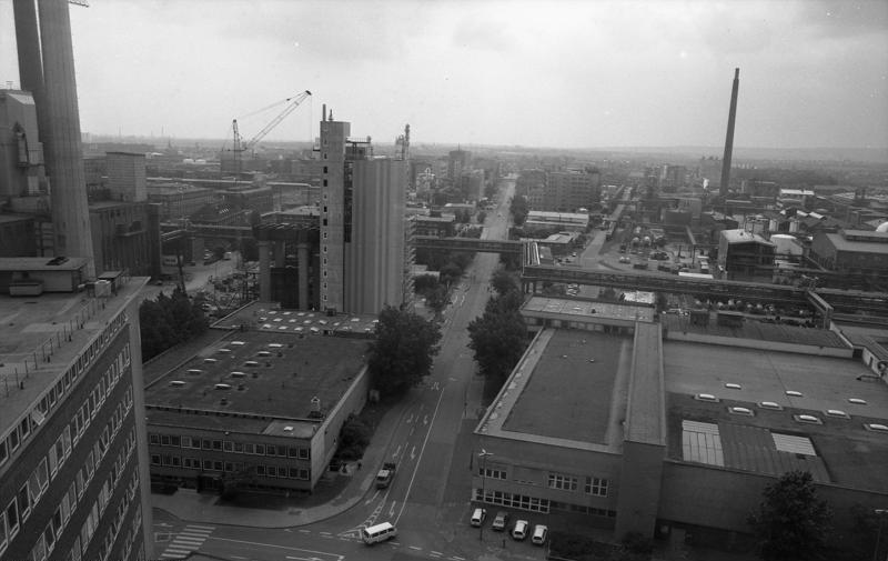 Juni 1988 Frankfurt-Hoechst Hoechst AG (Chemiewerk)